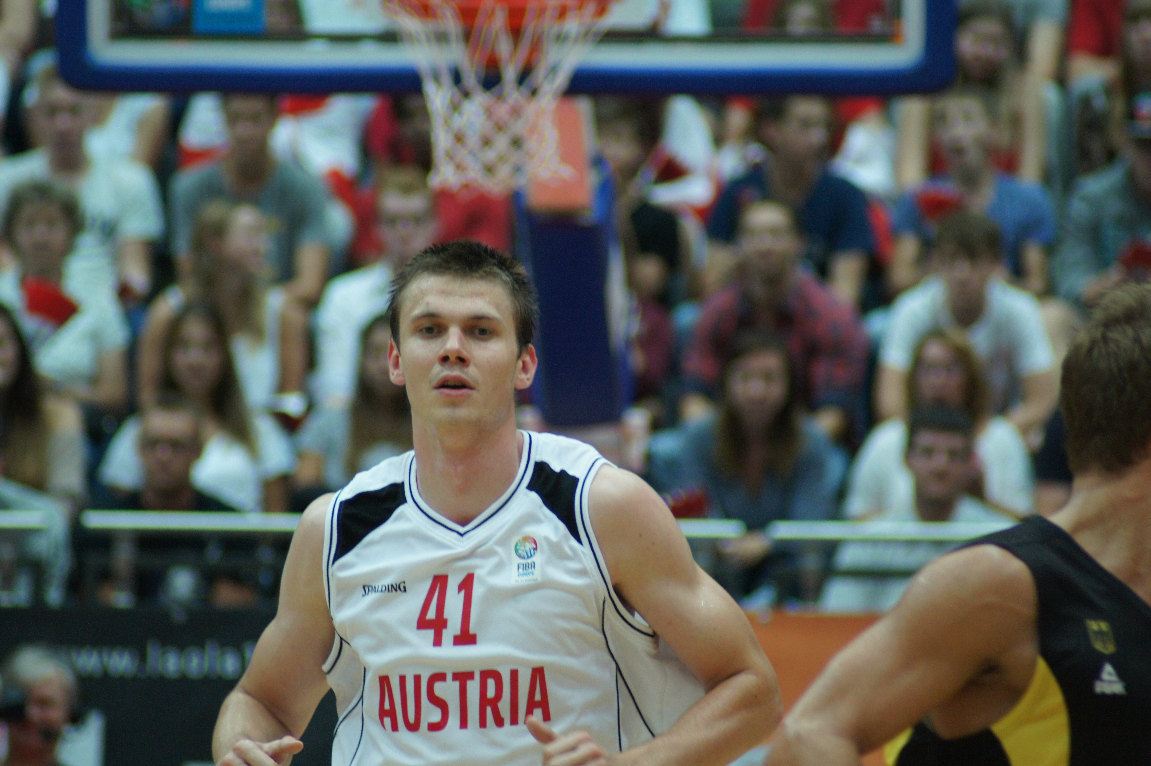 Qualifikationsspiel EuroBasket Österreich - Deutschland, 13. August 2014 im Multiversum Schwechat.